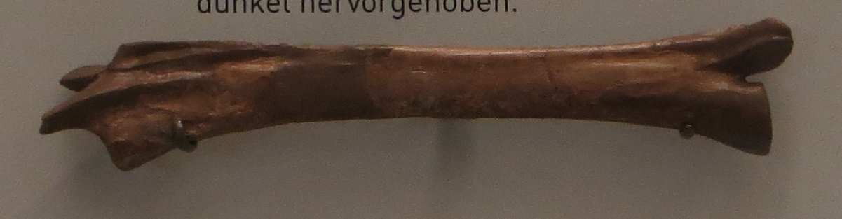 Fossil of Tanystropheus- Took the picture at Museum am Lowentor, Stuttgart